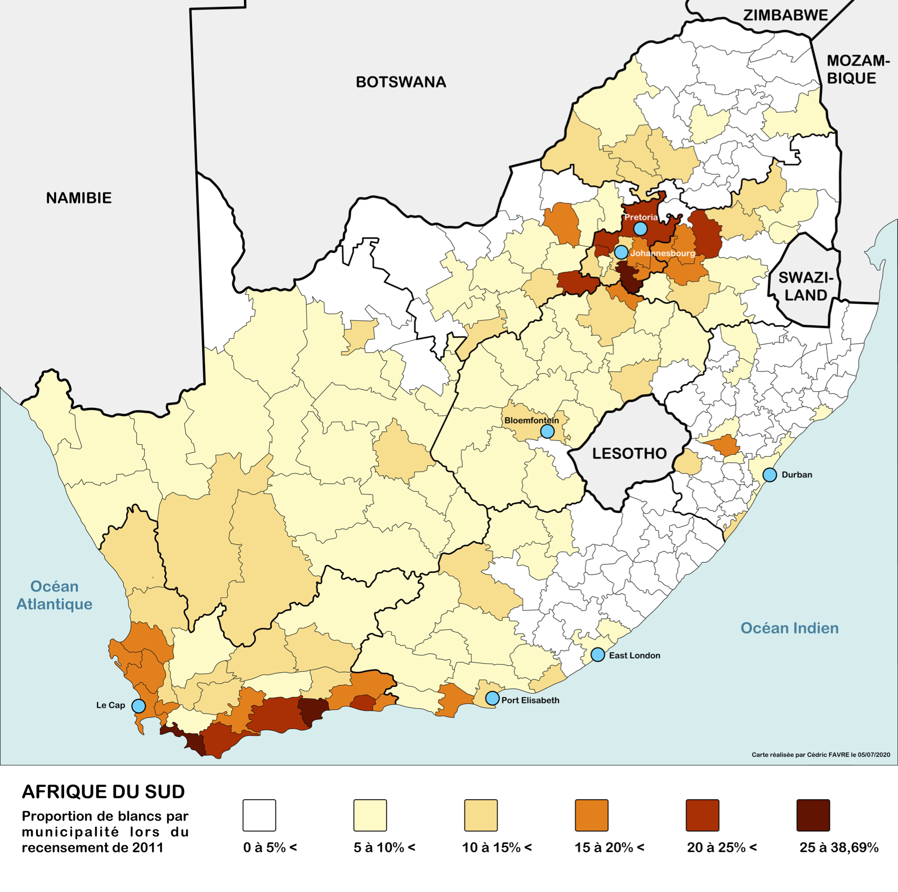 Carte mettant en évidence la répartition spatiale des blancs sud-africains par municipalité lors du recensement de 2011.